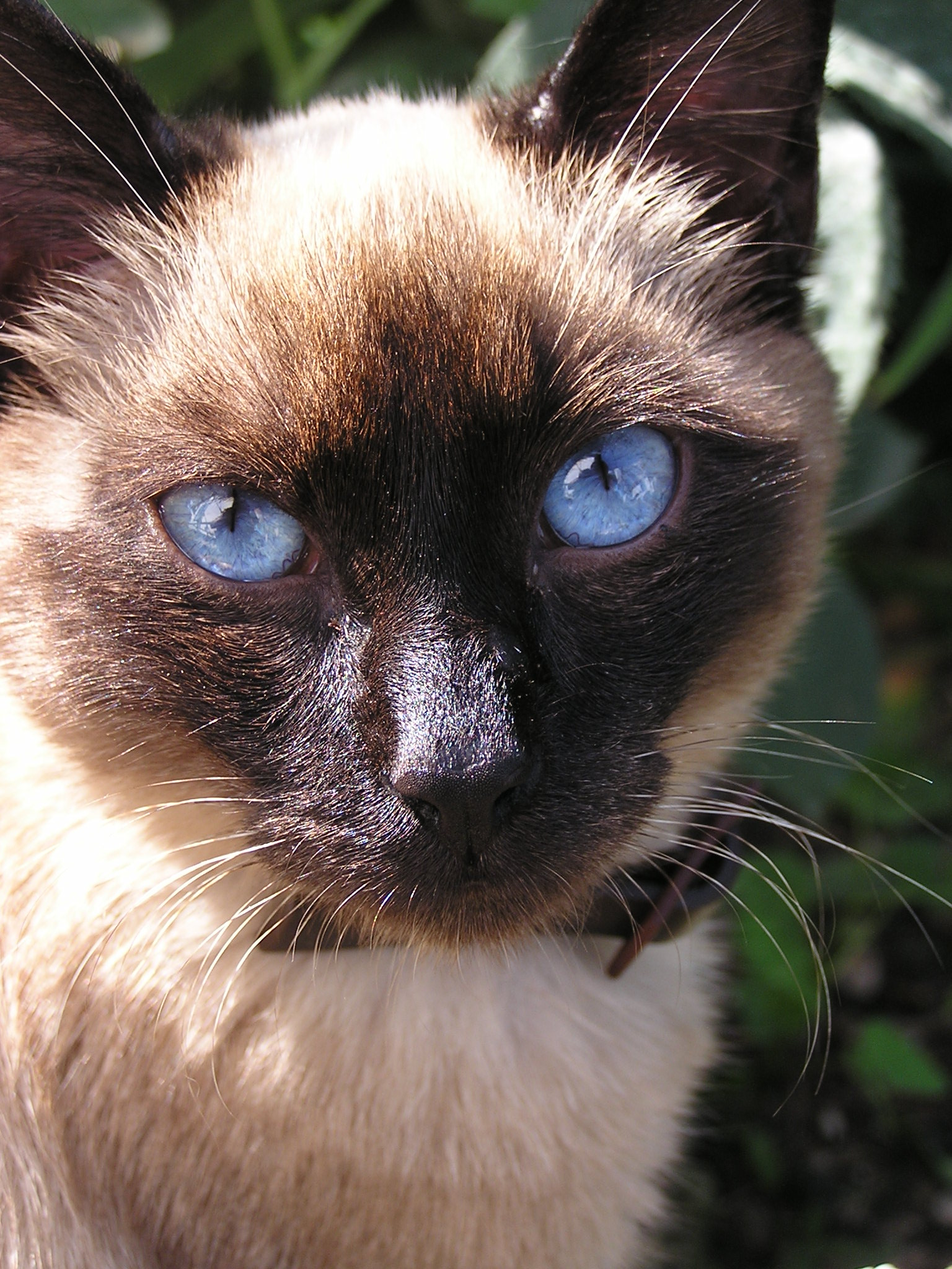 Кошка